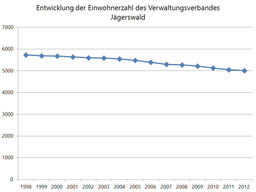 Diagramm der Bevölkerungsentwicklung des Verwaltungsverbandes Jägerswald.